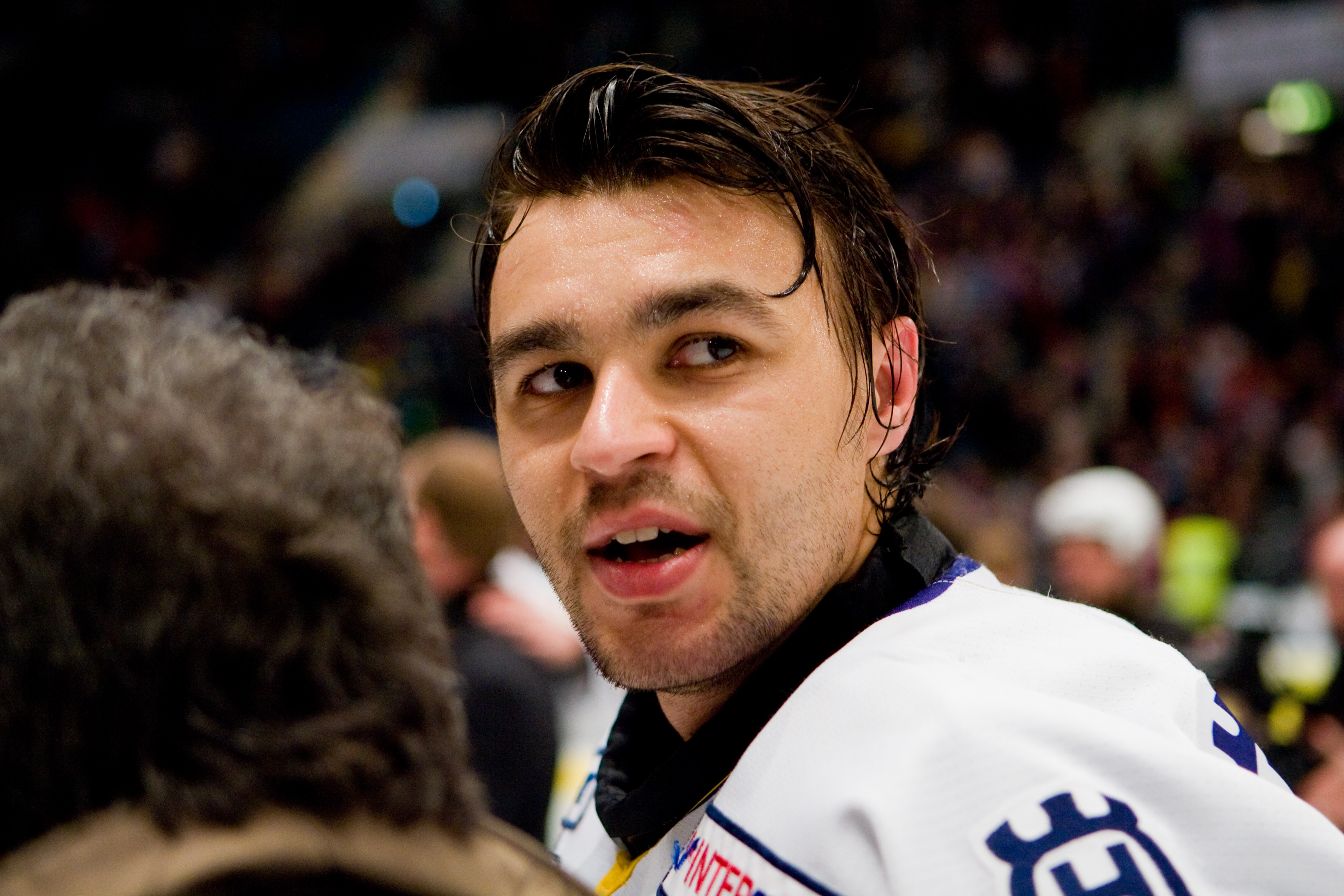 Stefan Liv i guldjublet efter SM-guldet på Hovet 24 april 2010.